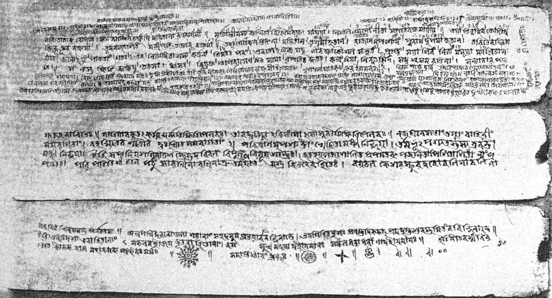 Extraits d'un manuscript du Kichaka-Vadha de Nitivarman (vers 1600)